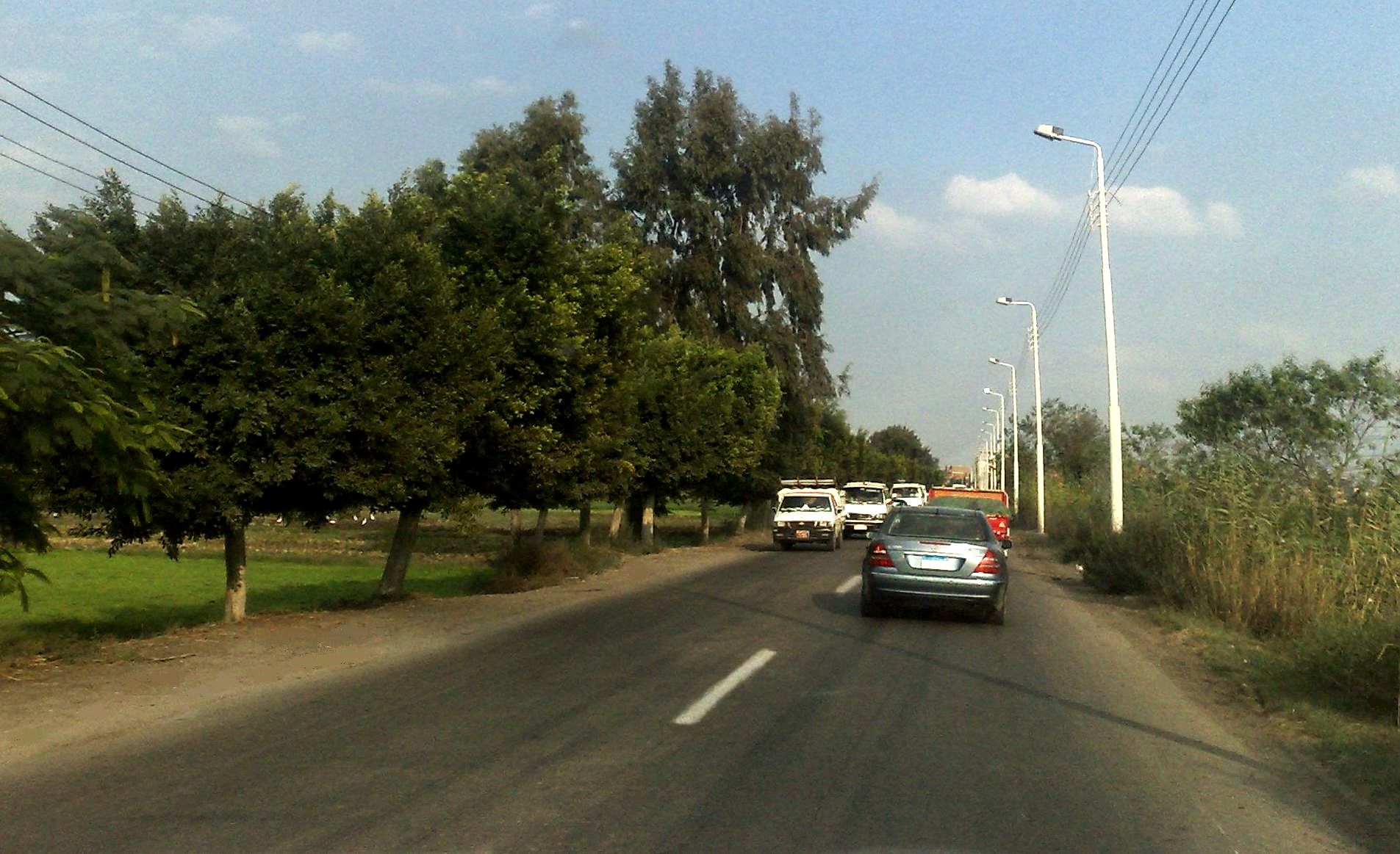 طريق دسوق - كفر الشيخ، محافظة كفر الشيخ